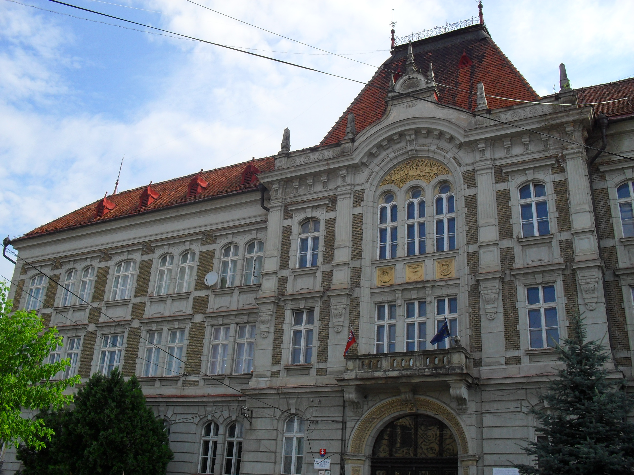 Rimaszombat - szlovák gimnázium (Hodža utca)